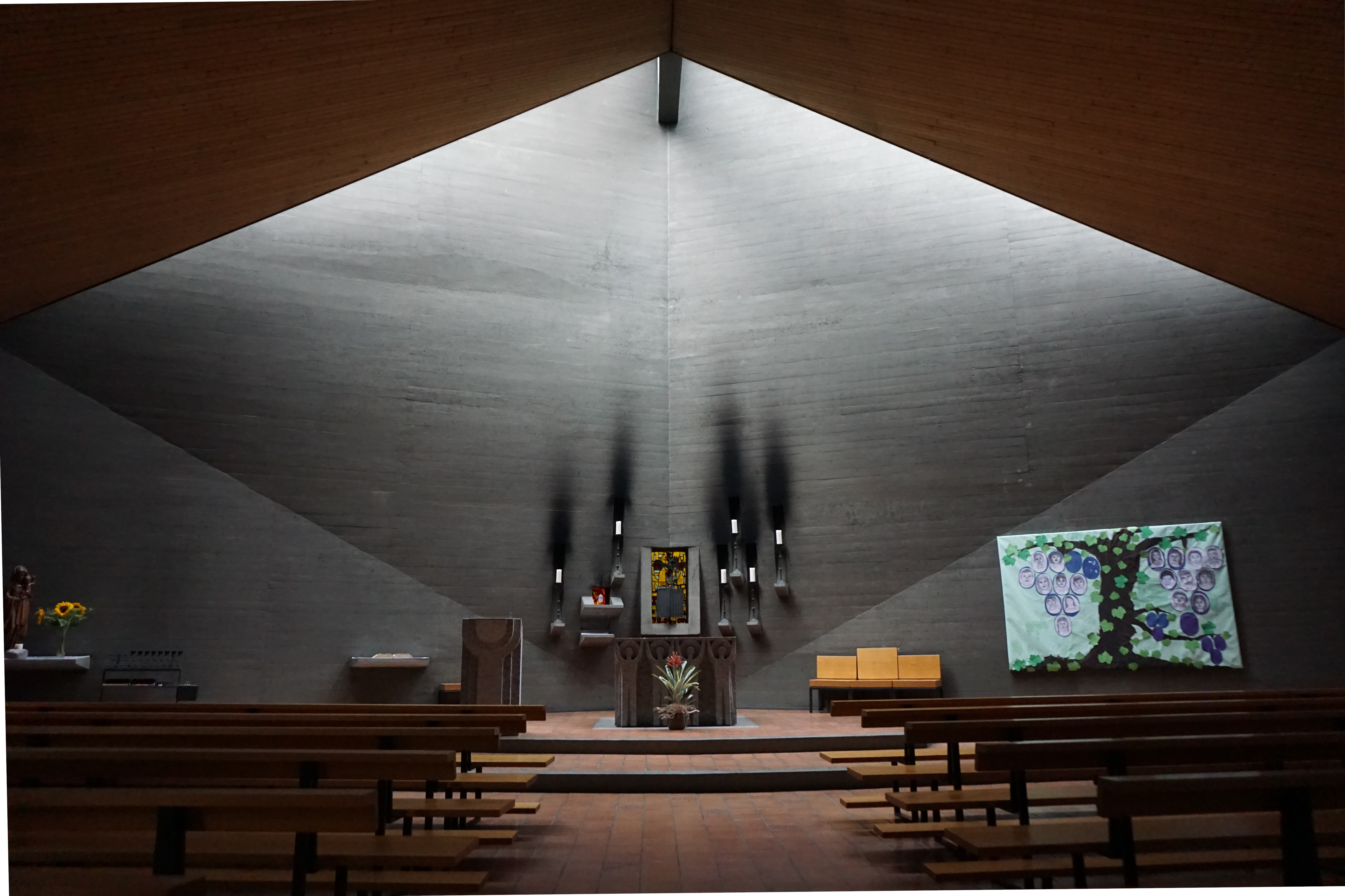 Römisch-katholische Kirche St. Maria von Ins. Innenraum